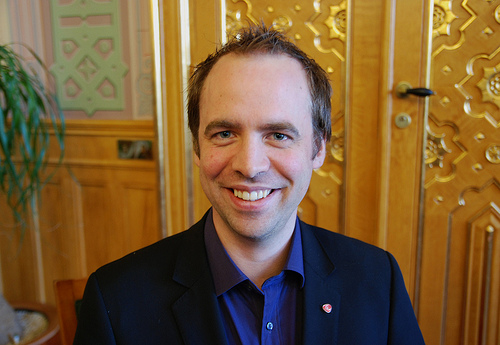 Arild Stokkan-Grande